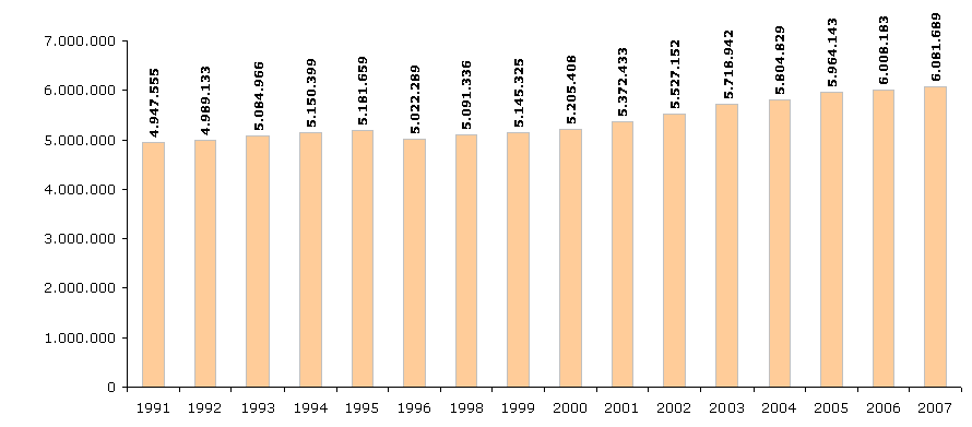 Evolución demográfica de la Comunidad de Madrid, por años